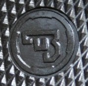 לוגו CZ על קת אקדח